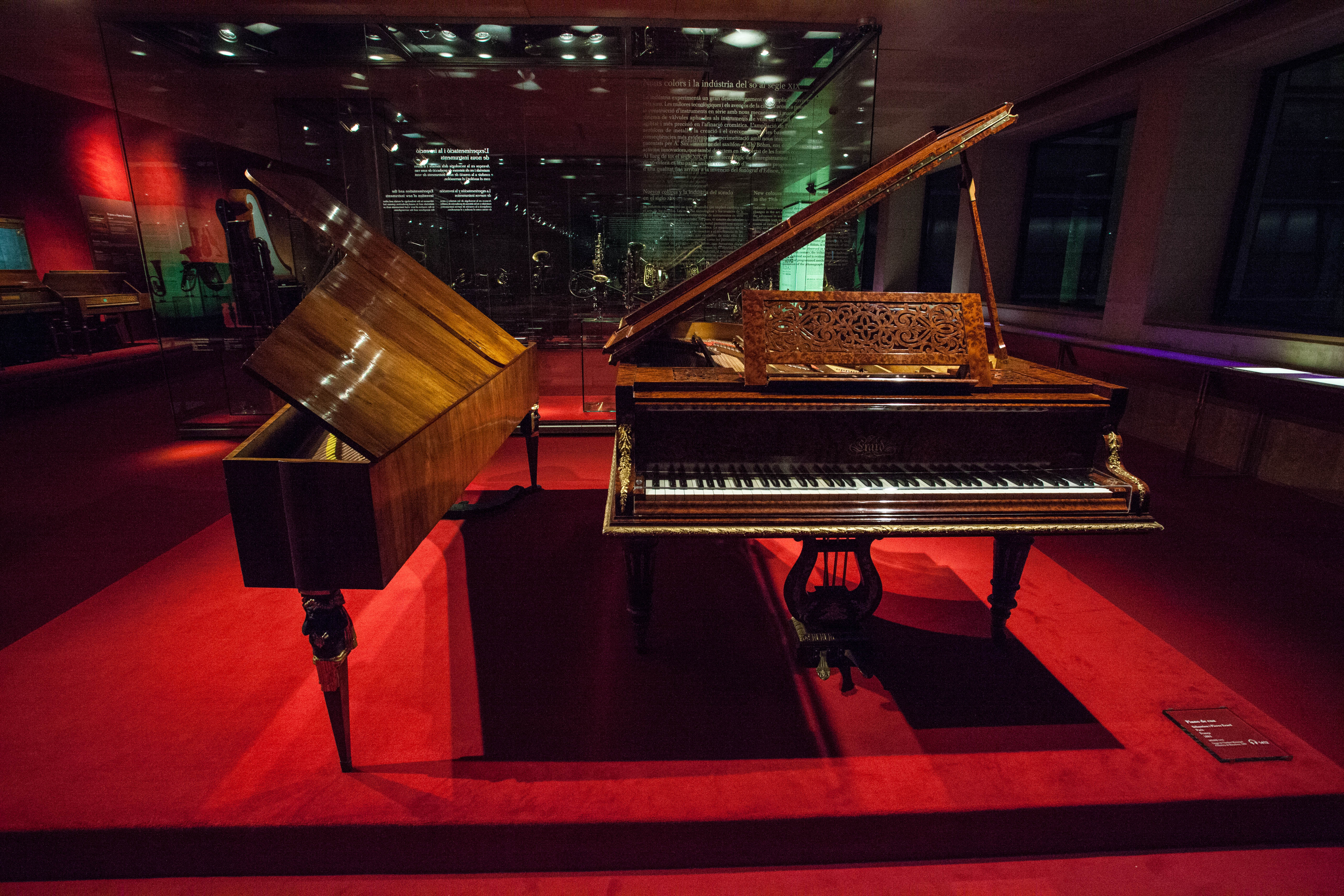 Pianos Érard i Thijn & Co. right: Piano de cua Sébastien i Pierre Érard Paris França 1884 ...